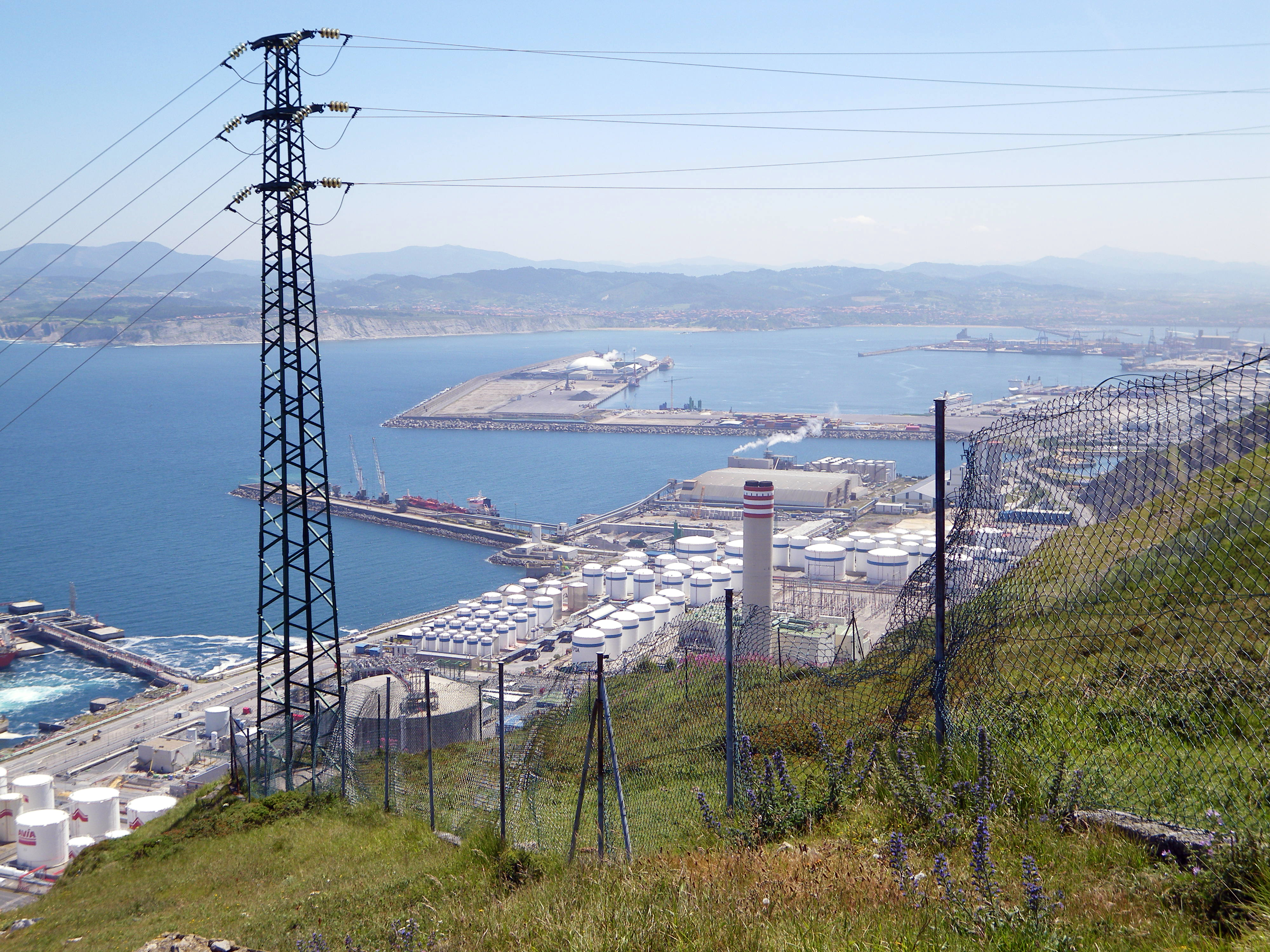 Bilboko kanpo portua, Argizagi menditik ikusita (Zierbena, Bizkaia).